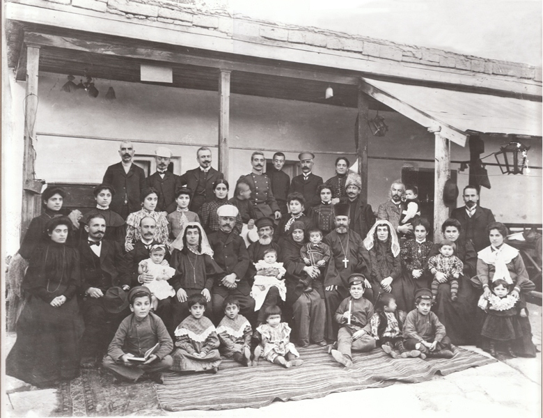 Ստեփան Եգիզարովը իր ընտանիքի հետ 1906 թվականին